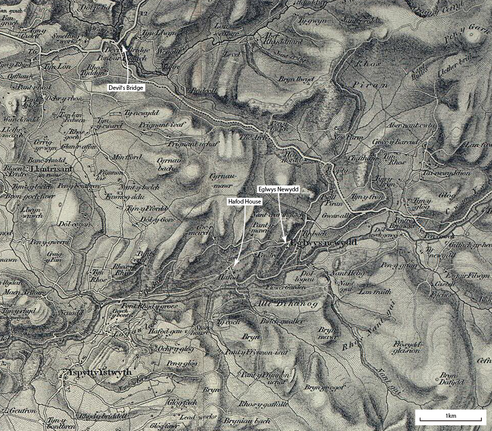 Vorläufige Karte zum Hafod Estate